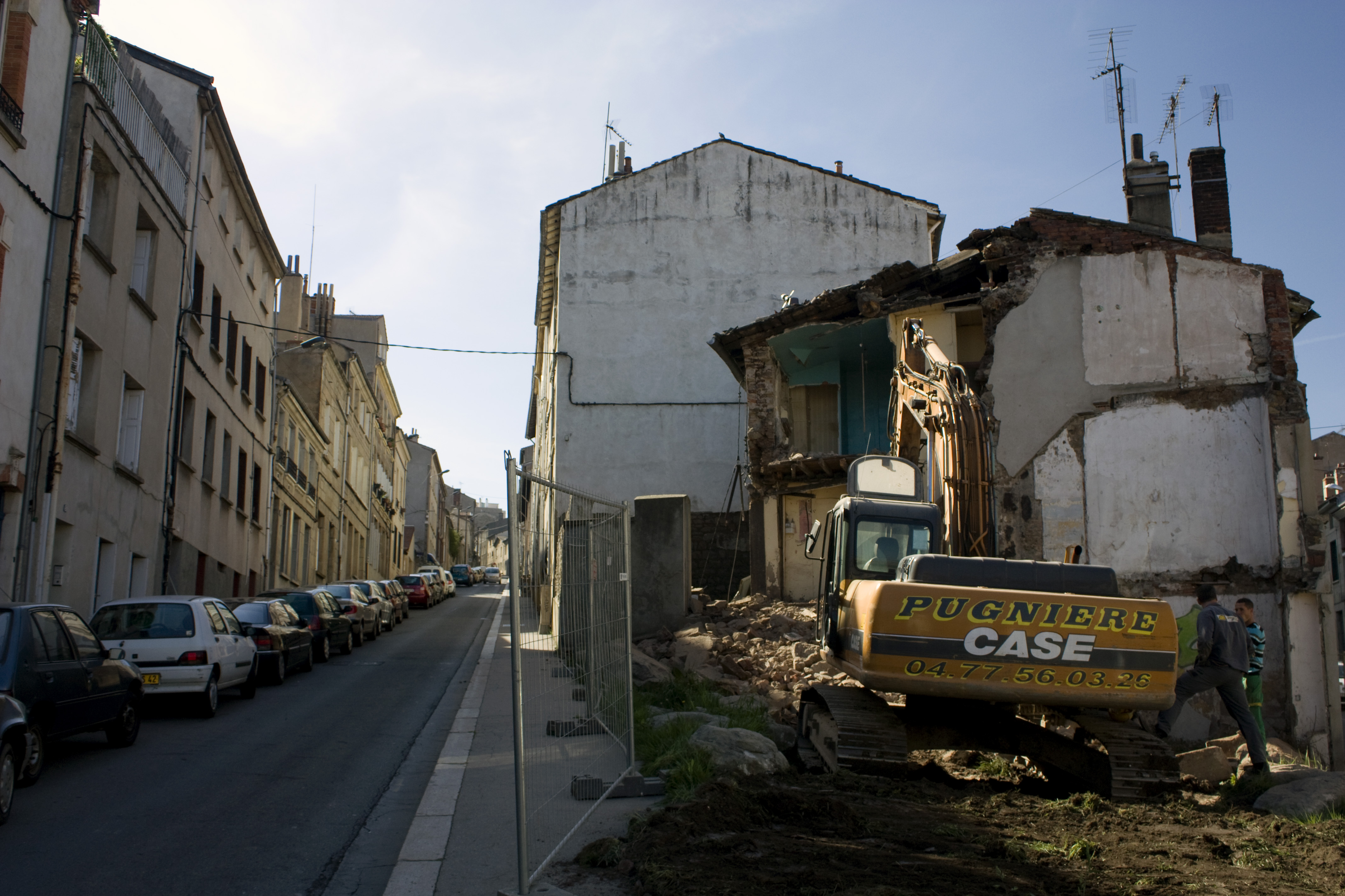 Démolition d'un îlot insalubre à Saint-Etienne.